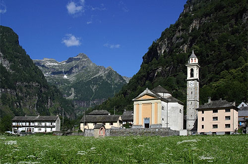 Sonogno